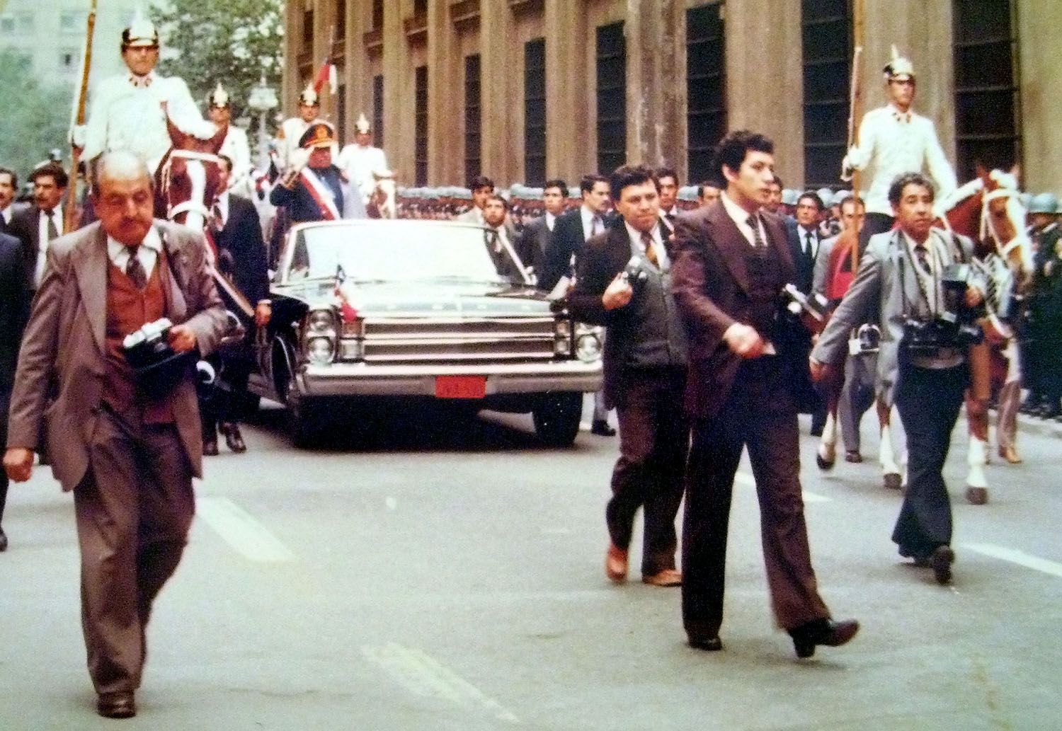 Augusto Pinochet - Défilé du neuvième anniversaire du coup d’État, le long de La Moneda, Santiago de Chile